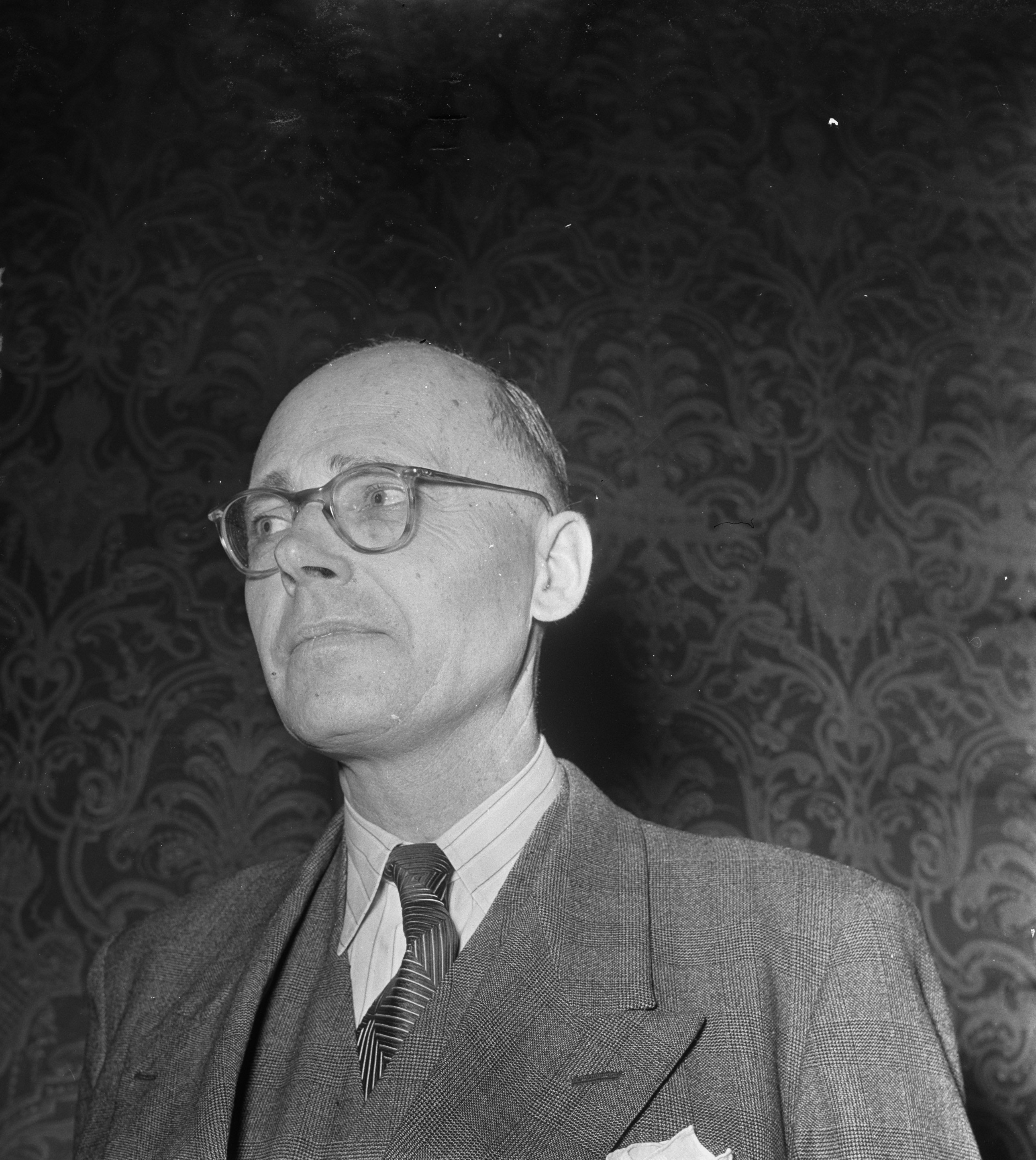 Collectie / Archief : Fotocollectie Anefo Reportage / Serie : [ onbekend ] Beschrijving : Installatie Deltacommissie. Voorzitter Ir. A.G. Maris Datum : 21 februari 1953 Trefwoorden : commissies, portretten, voorzitters, waterstaat Persoonsnaam : Maris, A.G. Fotograaf : Noske, J.D. / Anefo Auteursrechthebbende : Nationaal Archief Materiaalsoort : Negatief (zwart/wit) Nummer archiefinventaris : bekijk toegang 2.24.01.03 Bestanddeelnummer : 905-5646